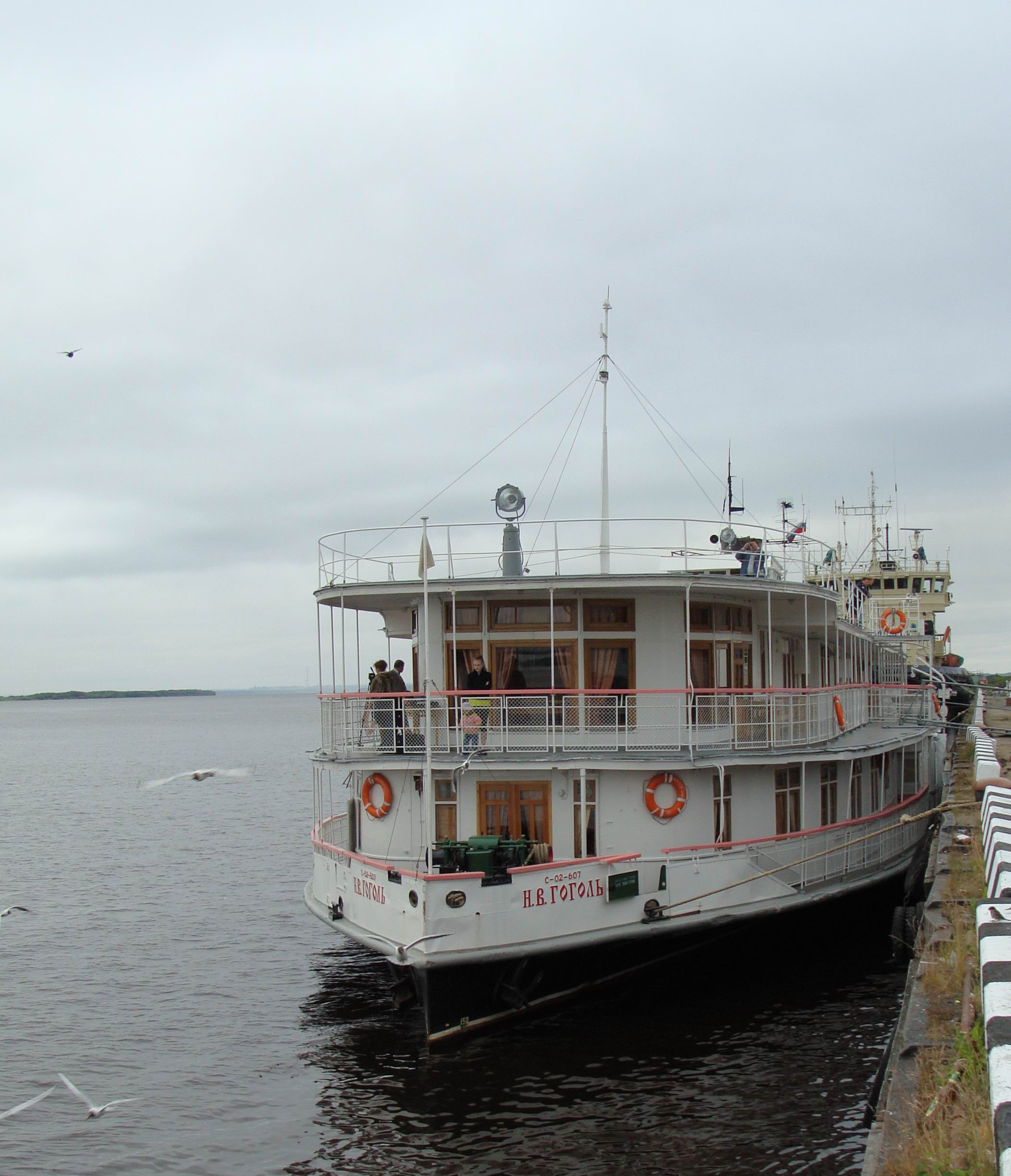 Пароход Н. В. Гоголь на причале в морском порту Архангельска